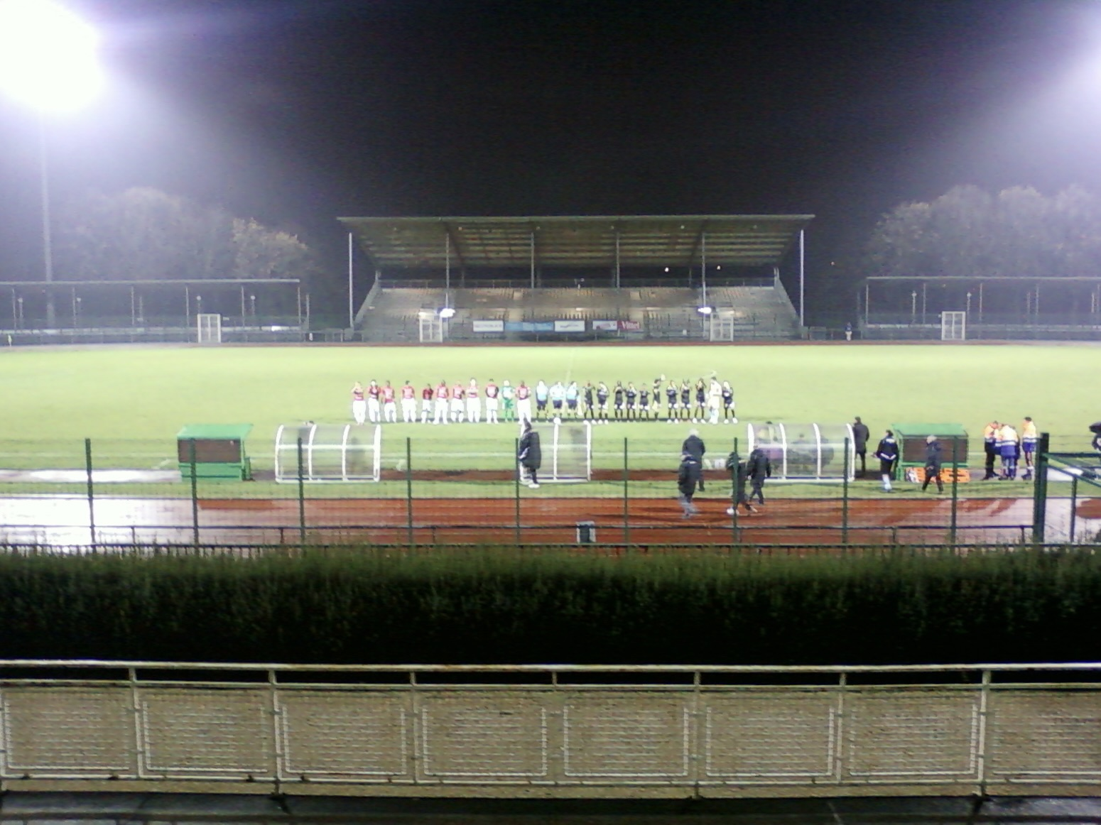 Présentation des équipes lors du match de National UJA Alfortville-Beauvais du 22 janvier 2011 au stade Marville de la Courneuve